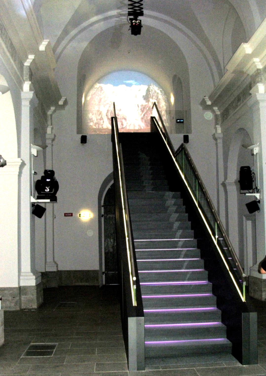 Vall'Aosta - Forte di Bard e Museo delle Alpi